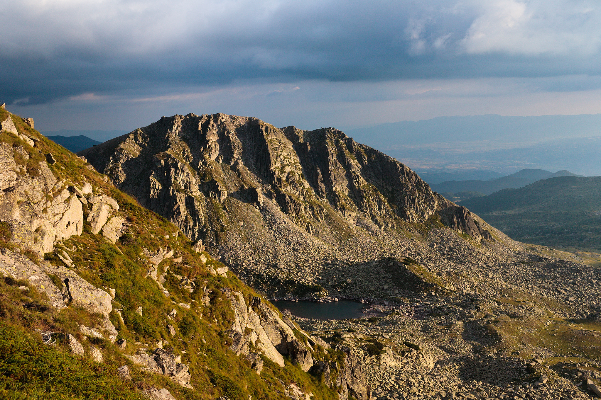 Пирин, Пирин, едно от Спанополските езера и в. Спанополски чукар